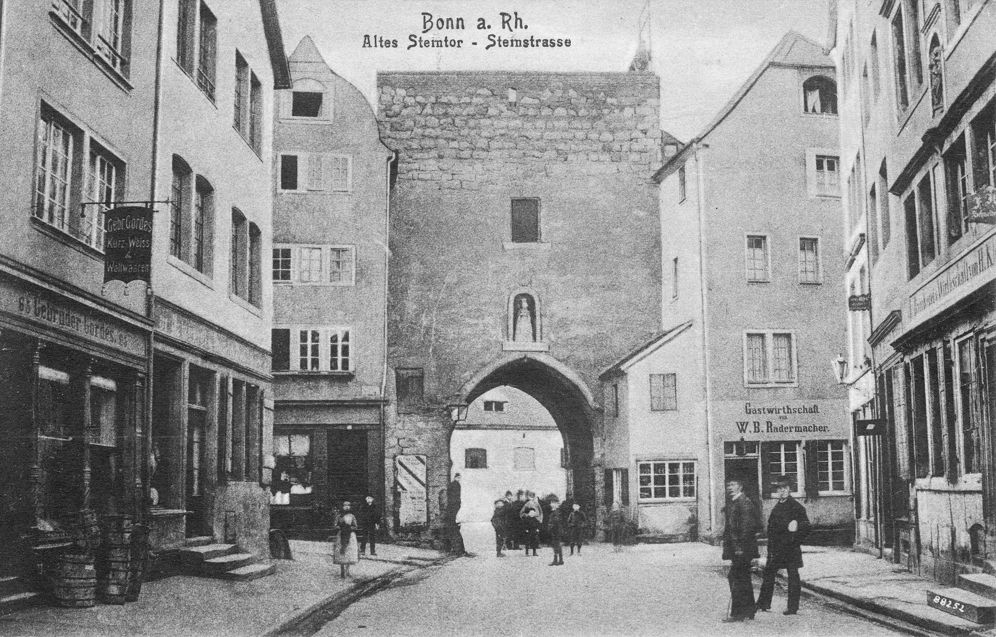 Sternstraße und Sterntor (Stadtseite) in Bonn